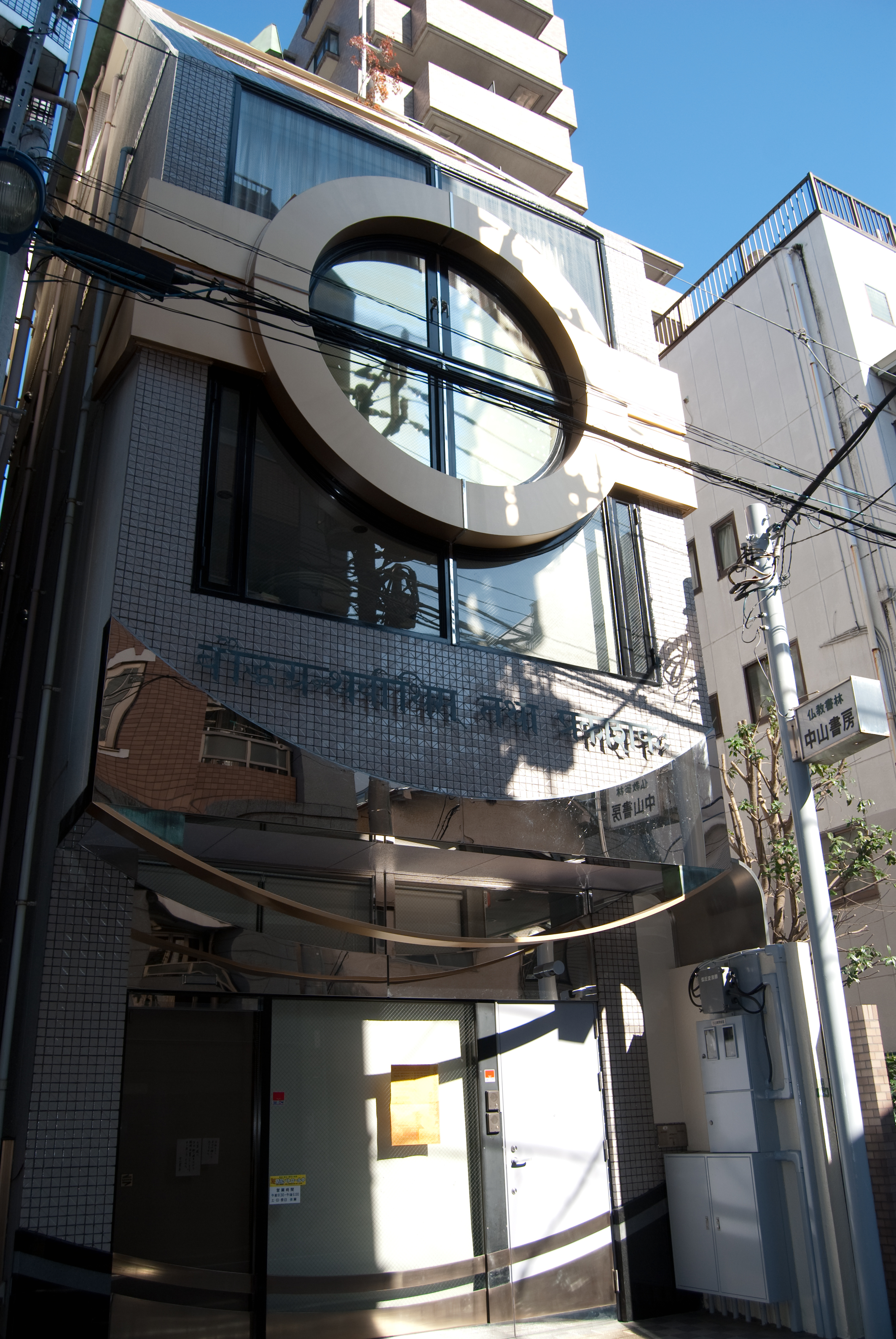 仏教書の書店・出版社のja:中山書房仏書林